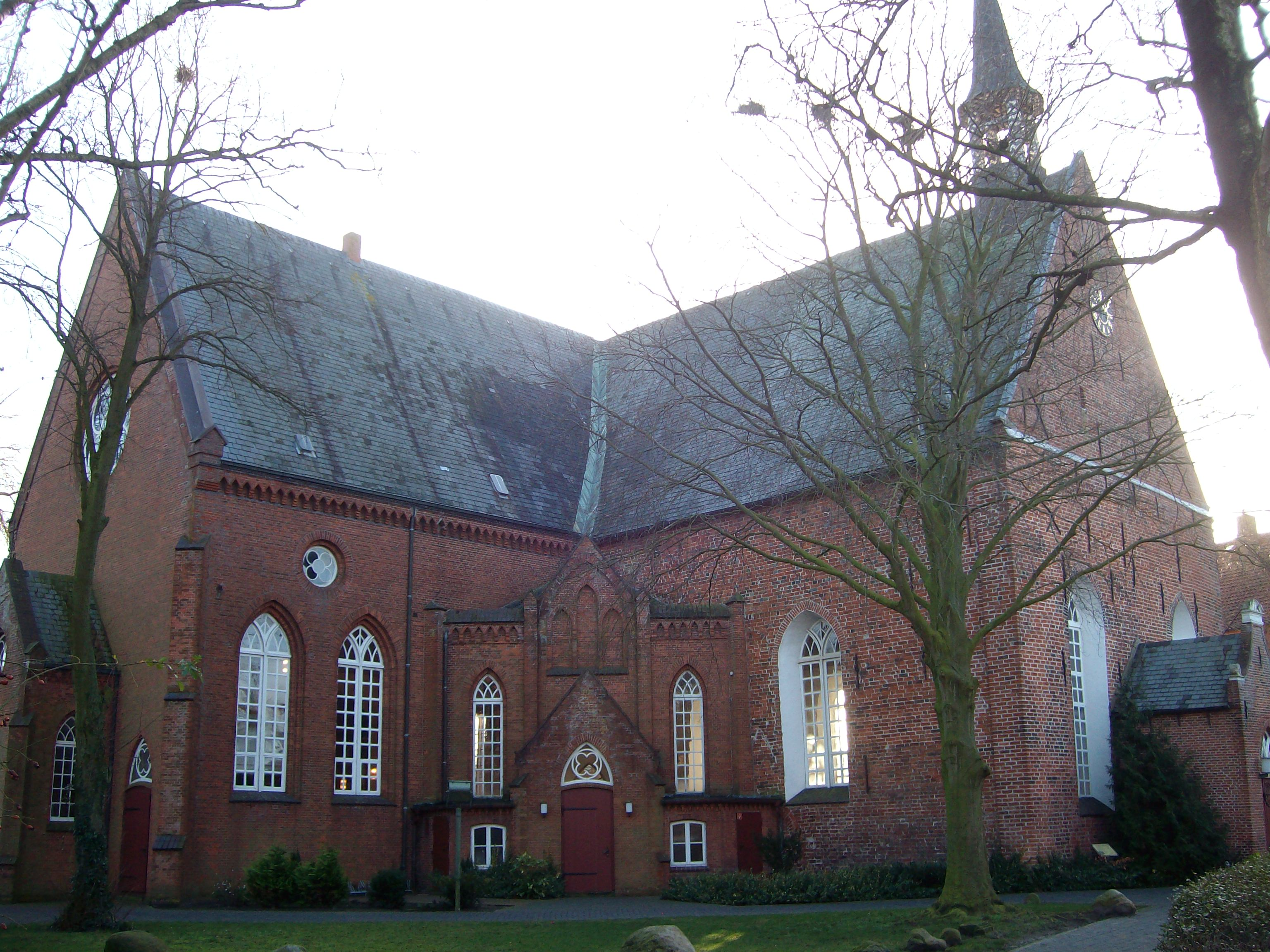 Nordostseite der Georgskirche in Weener, Ostfriesland